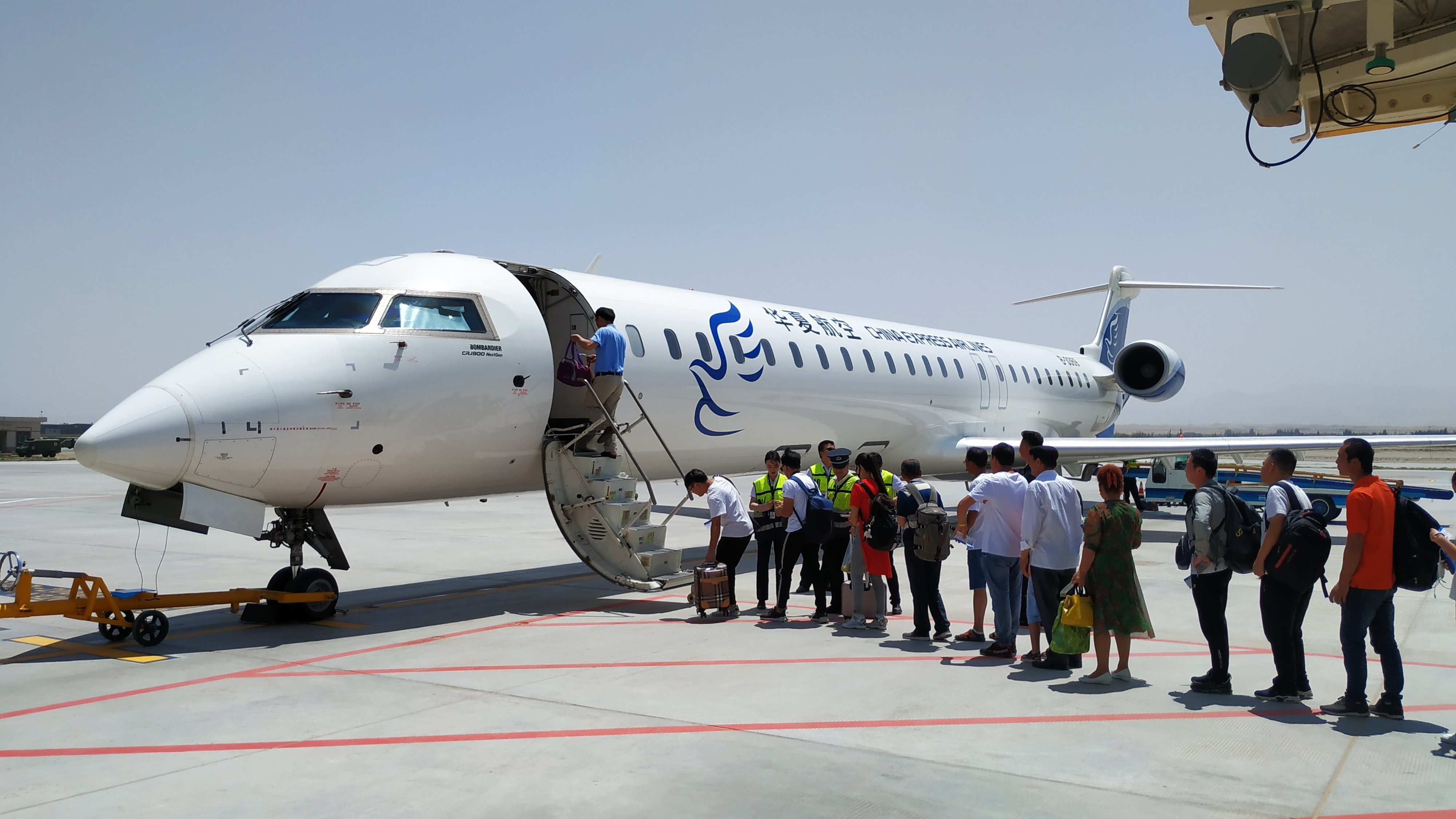 中文（中国大陆）: 和田机场停机坪